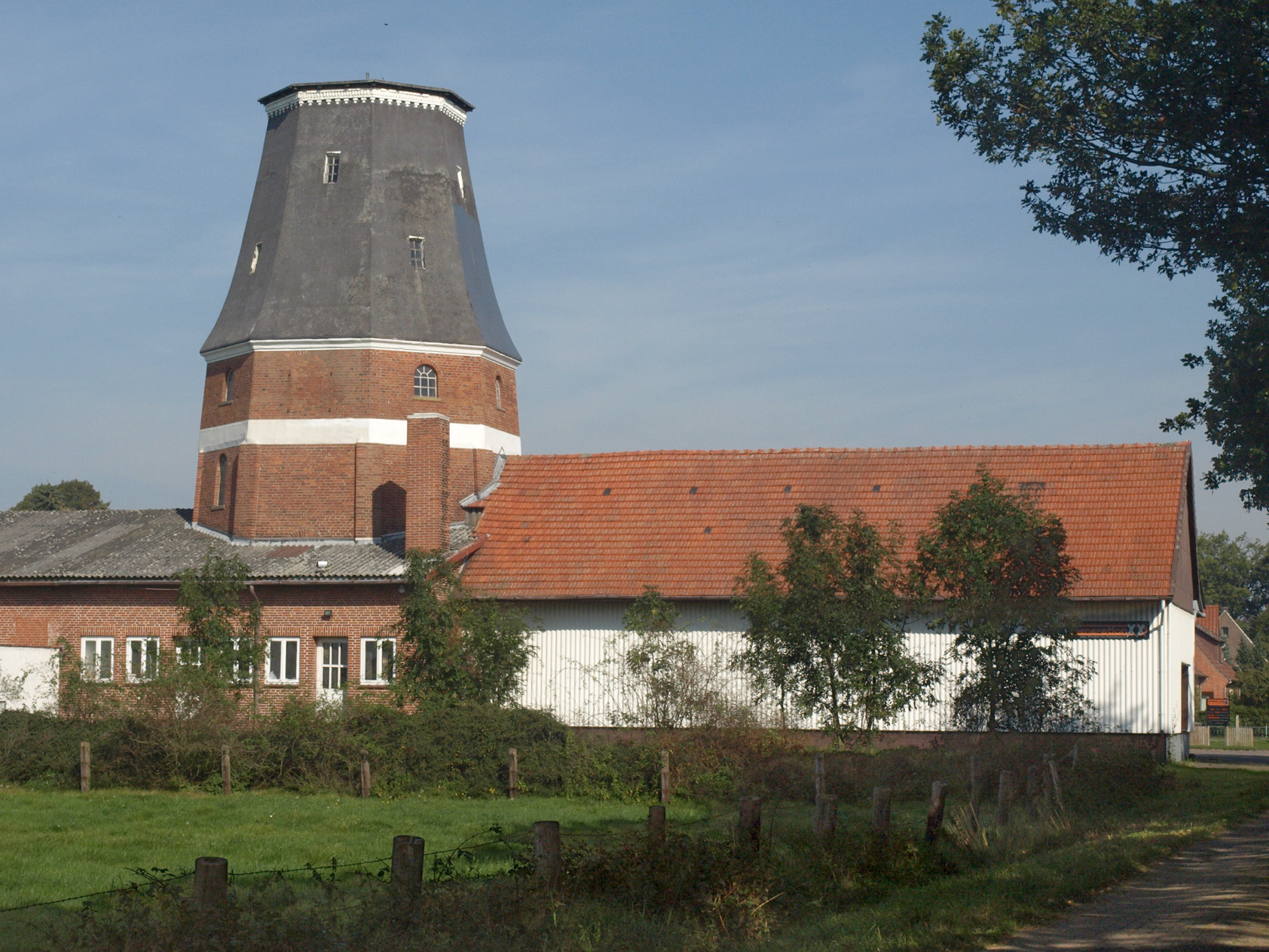 Thedinghausen-Wulmstorf (Niedersachsen), Mühlenstumpf, Foto: 2011